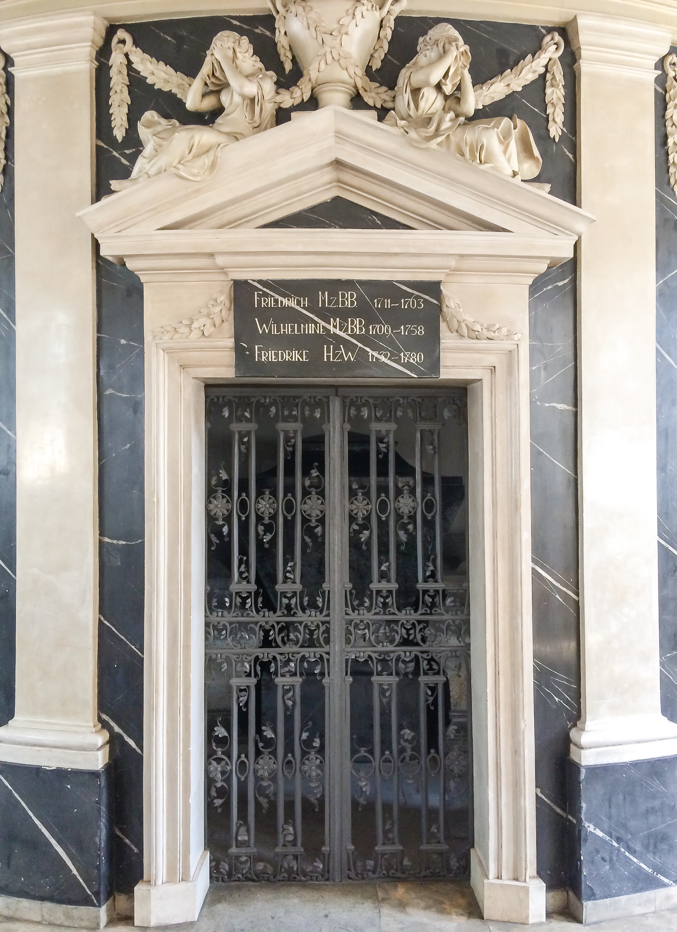 Bayreuth, Schlosskirche, Fürstengruft der Bayreuther Markgrafen (Markgräfin Wilhelmine, ihr Gatte Friedrich III. von Brandenburg-Bayreuth und die Tochter Elisabeth Friederike Sophie von Brandenburg-Bayreuth) (Teilansicht)